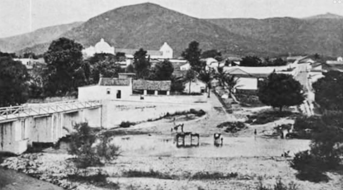 Salamá, Baja Verapaz, Guatemala. Publicada en 1897